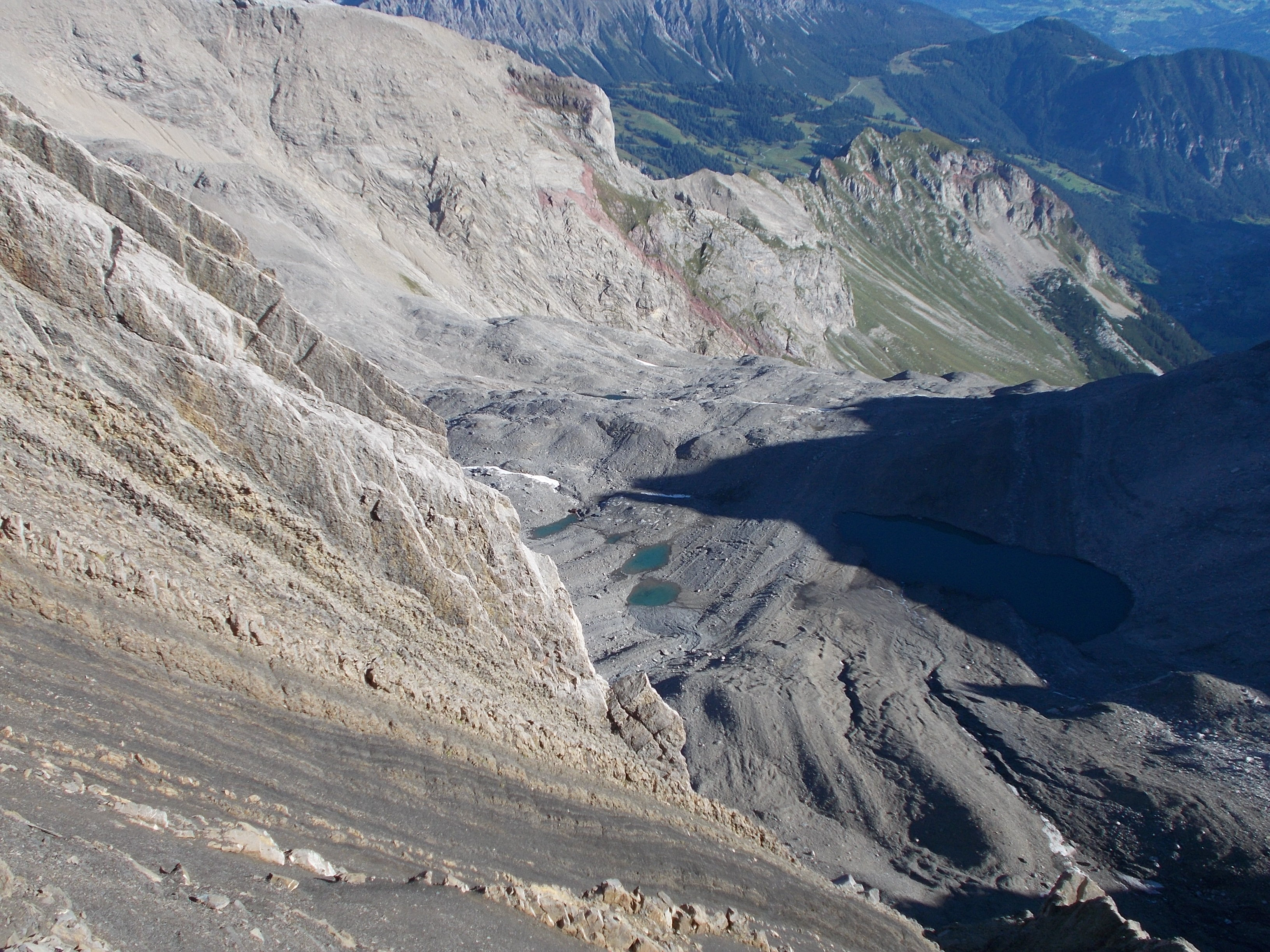 Blick von der Schesaplana: Die untere Hälfte des Brandner Gletscherbeckens ist seit vielen Jahren nur noch eine Steinwüste.